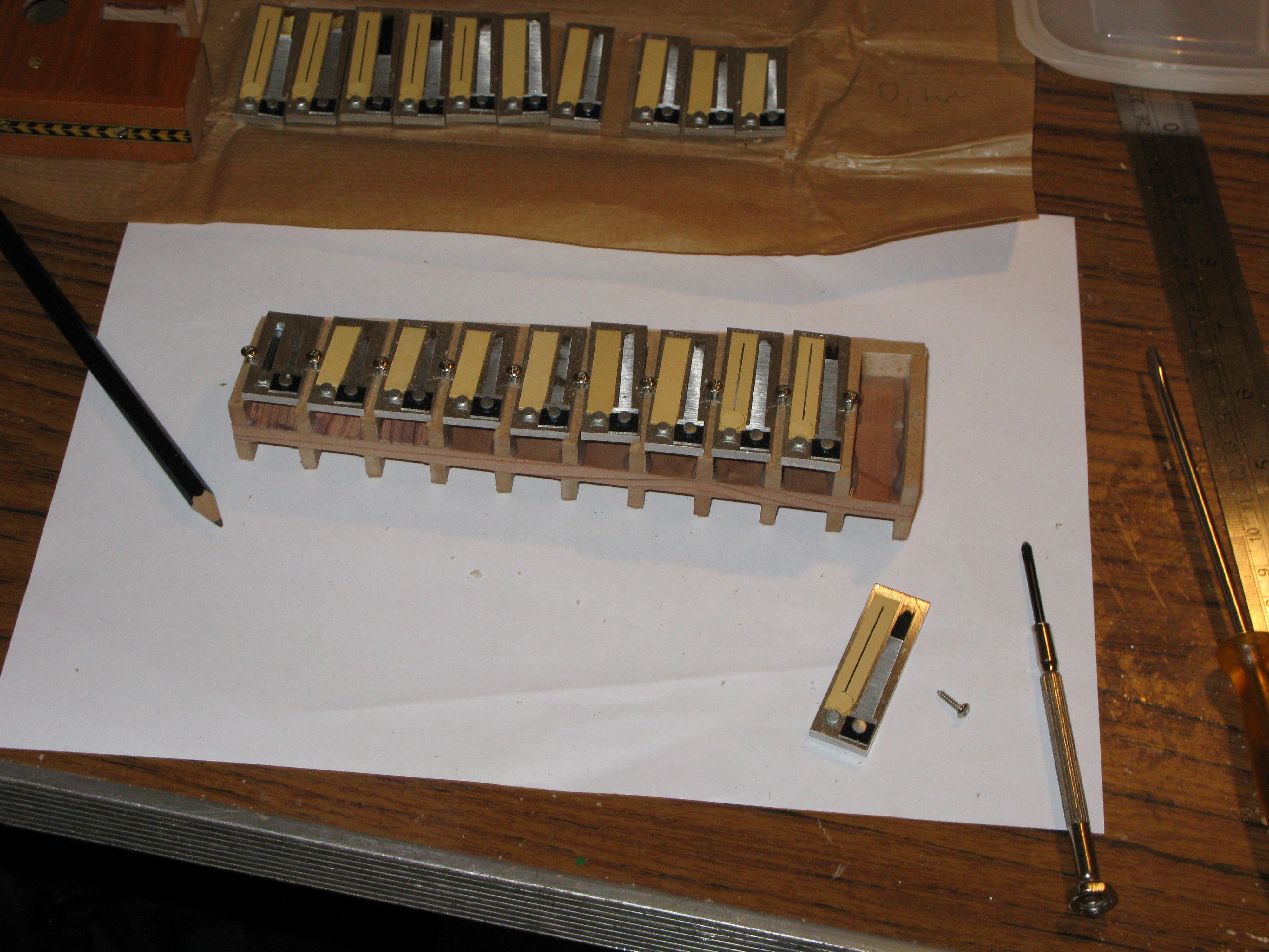 Treble Reeds being fitted.